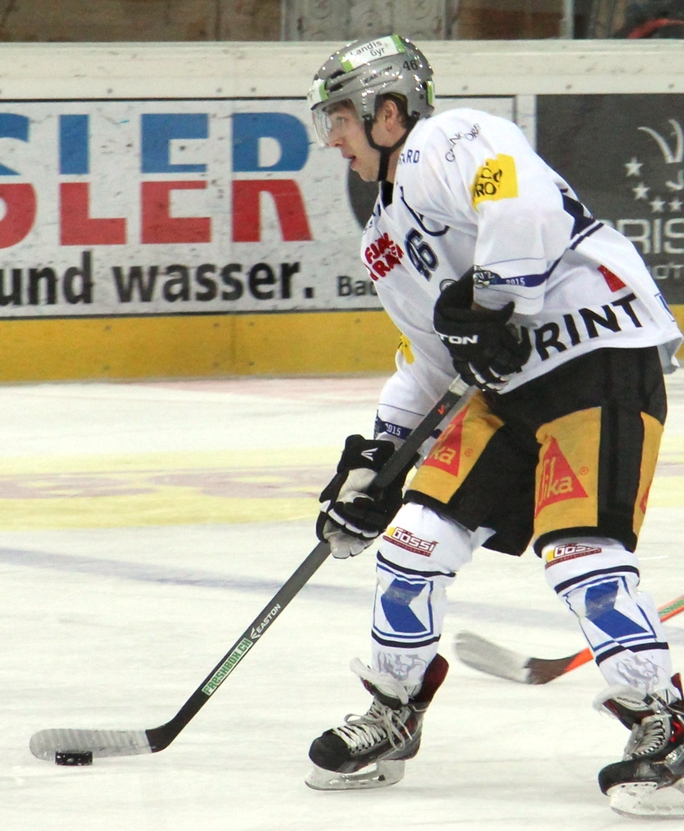 Perttu Lindgren (D 17), Lino Martschini (Z 46), Roman Kaderli (R 49), Reto Suri (Z 26), Dick Axelsson (D 28).